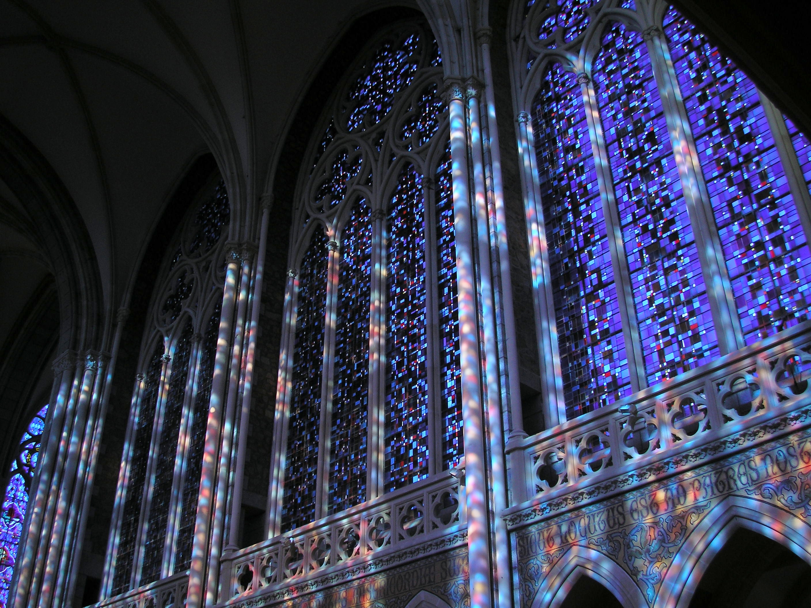 Pontmain (Pays de la Loire, France). Jeu de lumières entrant par les vitraux de la basilique sur les travées.